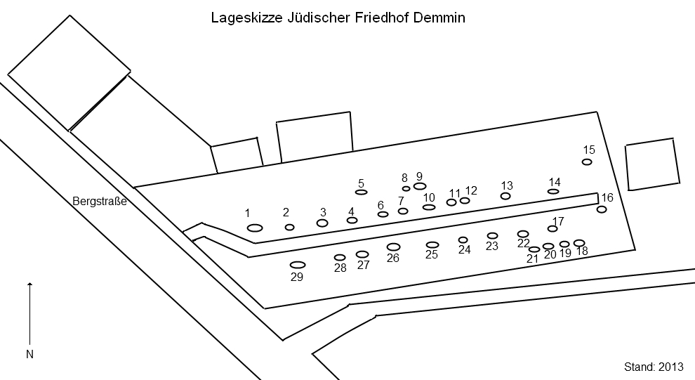 Lageskizze Jüdischer Friedhof Demmin, Stand: 2013